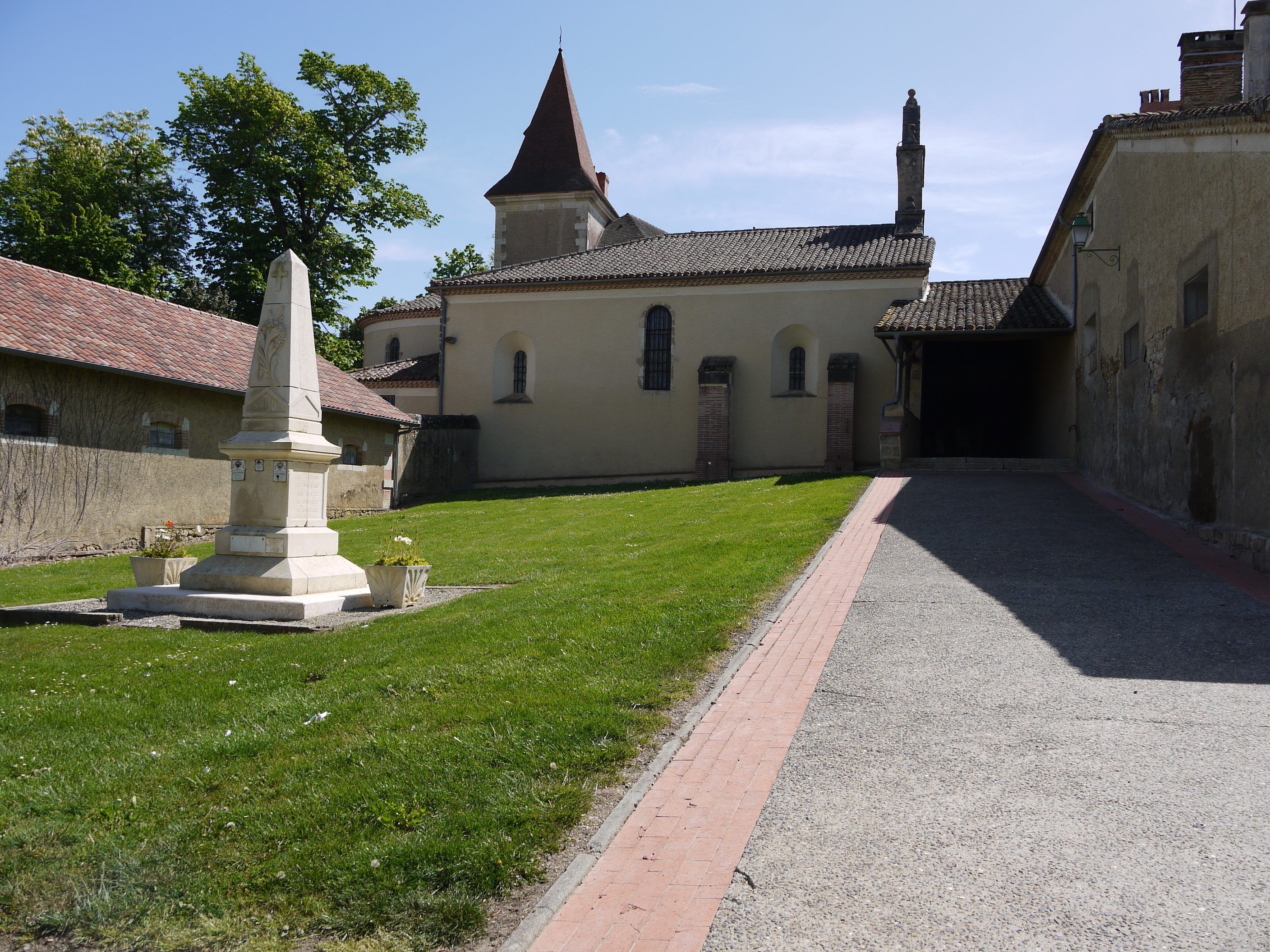 Le square Daniel Ferré à Marsan, avec l'église et le monument aux morts.